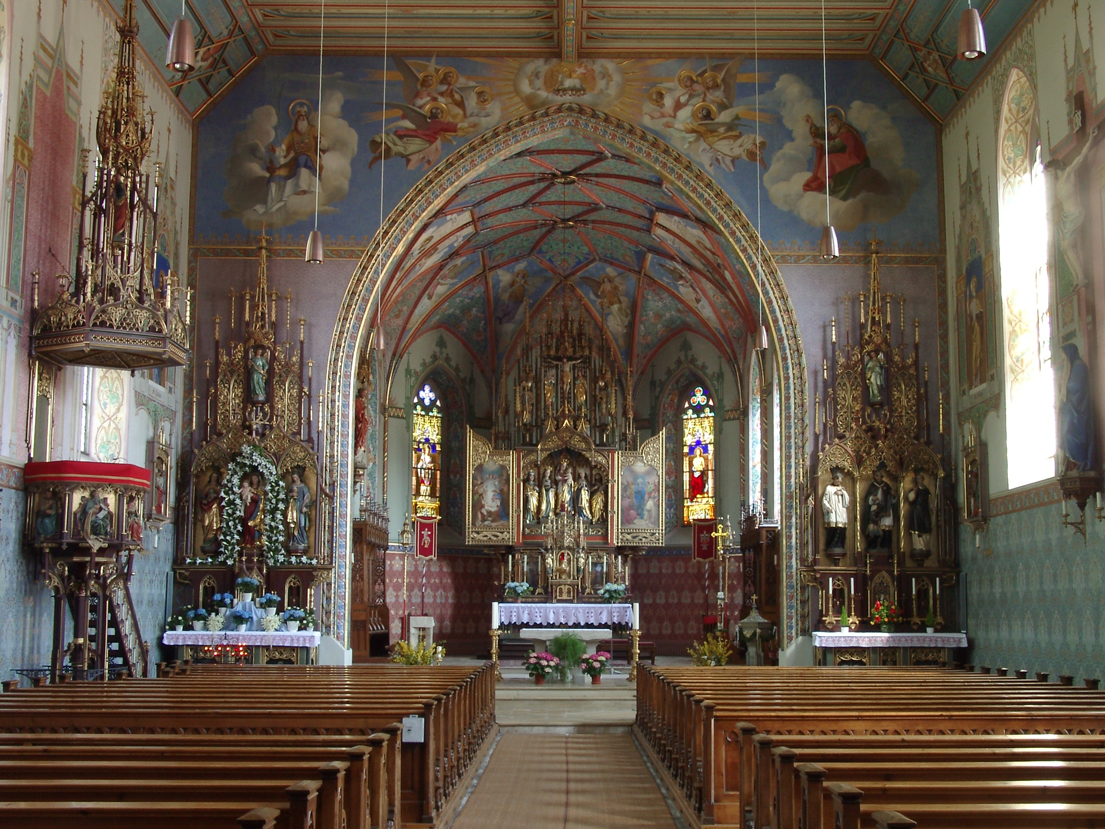 Innenraum der einheitlich neugotischen Pfarrkirche St. Pelagius in Weitnau, erbaut: 1862-72